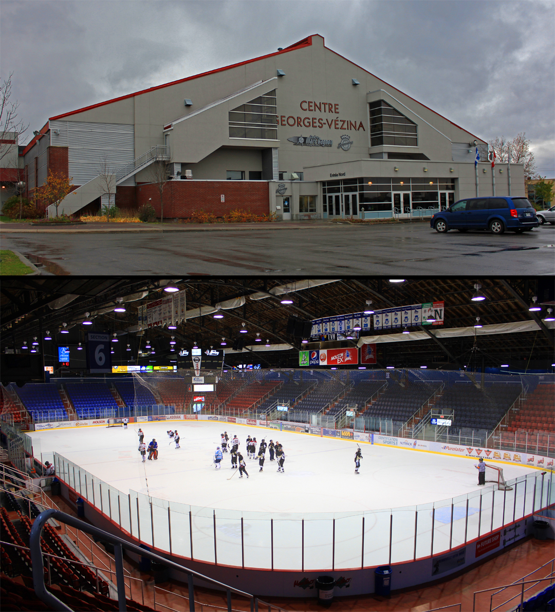 Composition Centre George-Vézina, Chicoutimi